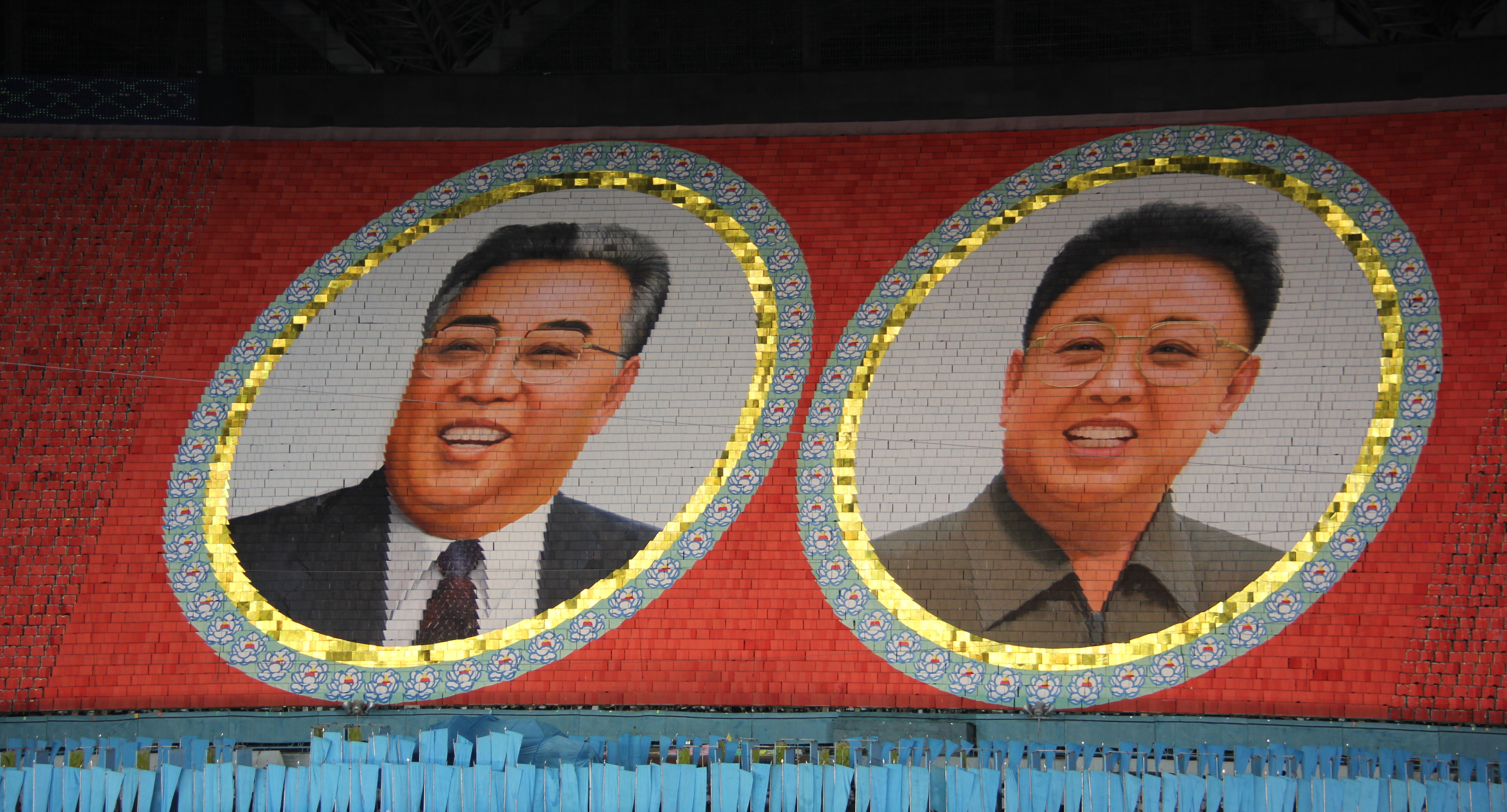 Arirang Mass Games